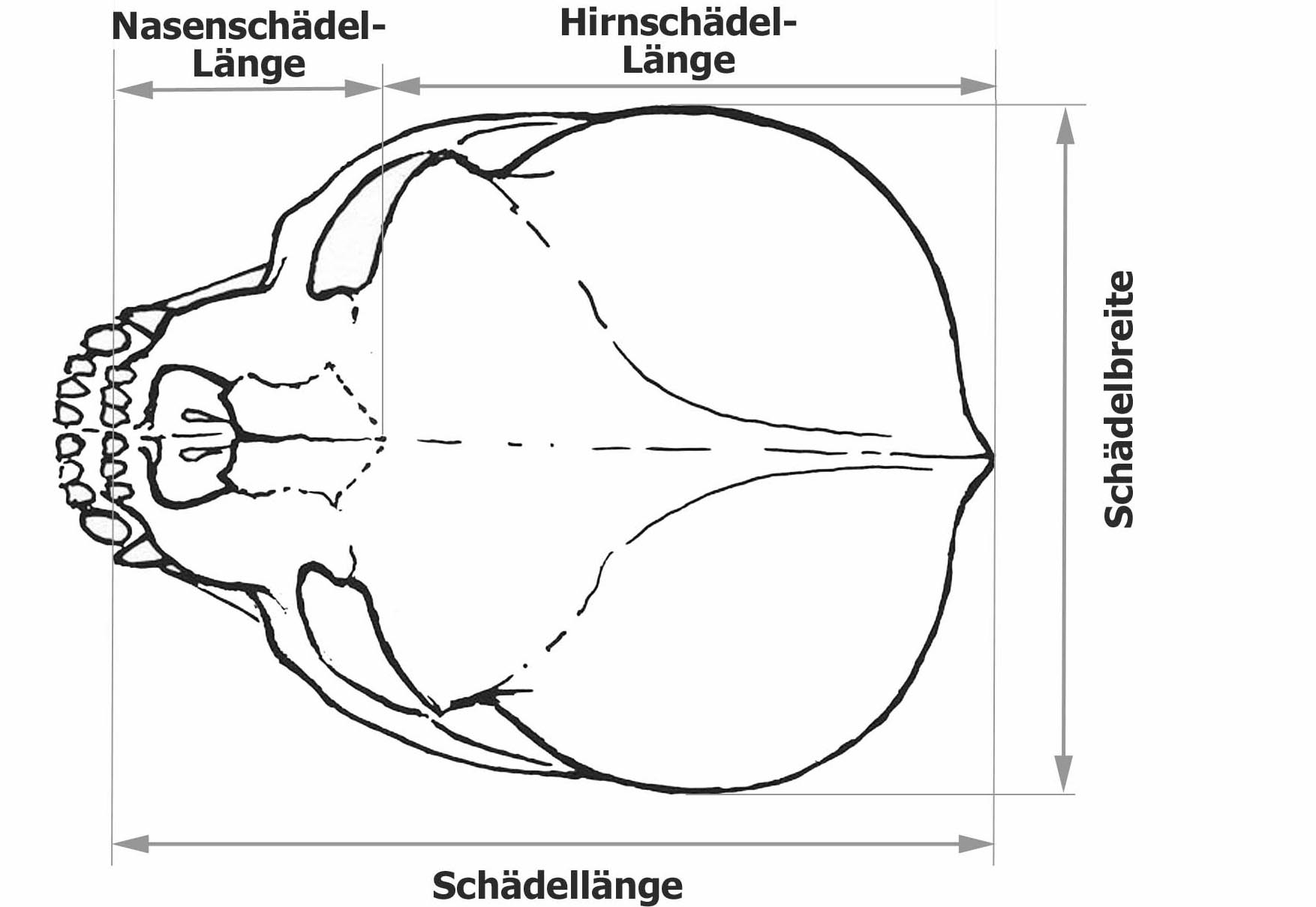 Schädelmessungen